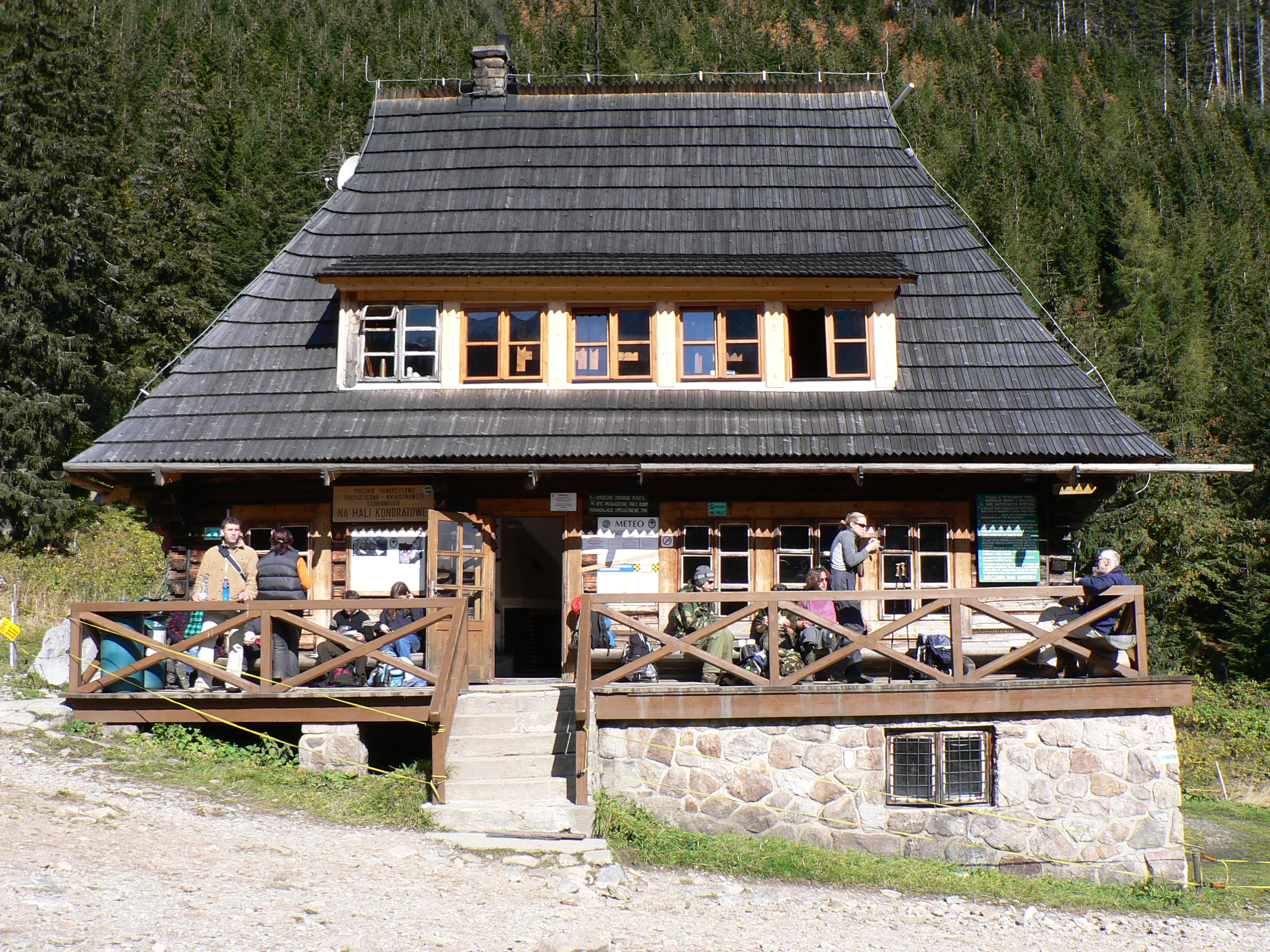 Schronisko PTTK na Hali Kondratowej